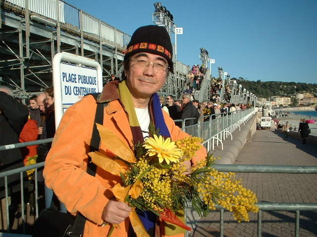 南フランスのカ－ニバルの取材旅行